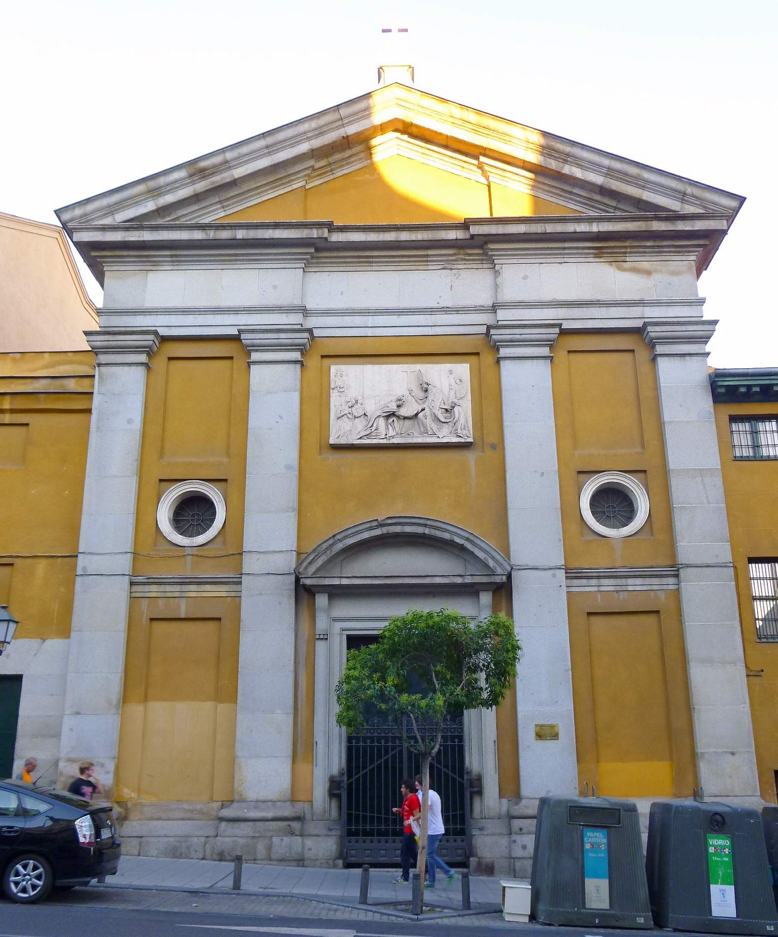 Segundo Monasterio de la Visitación (Salesas Nuevas), en Madrid